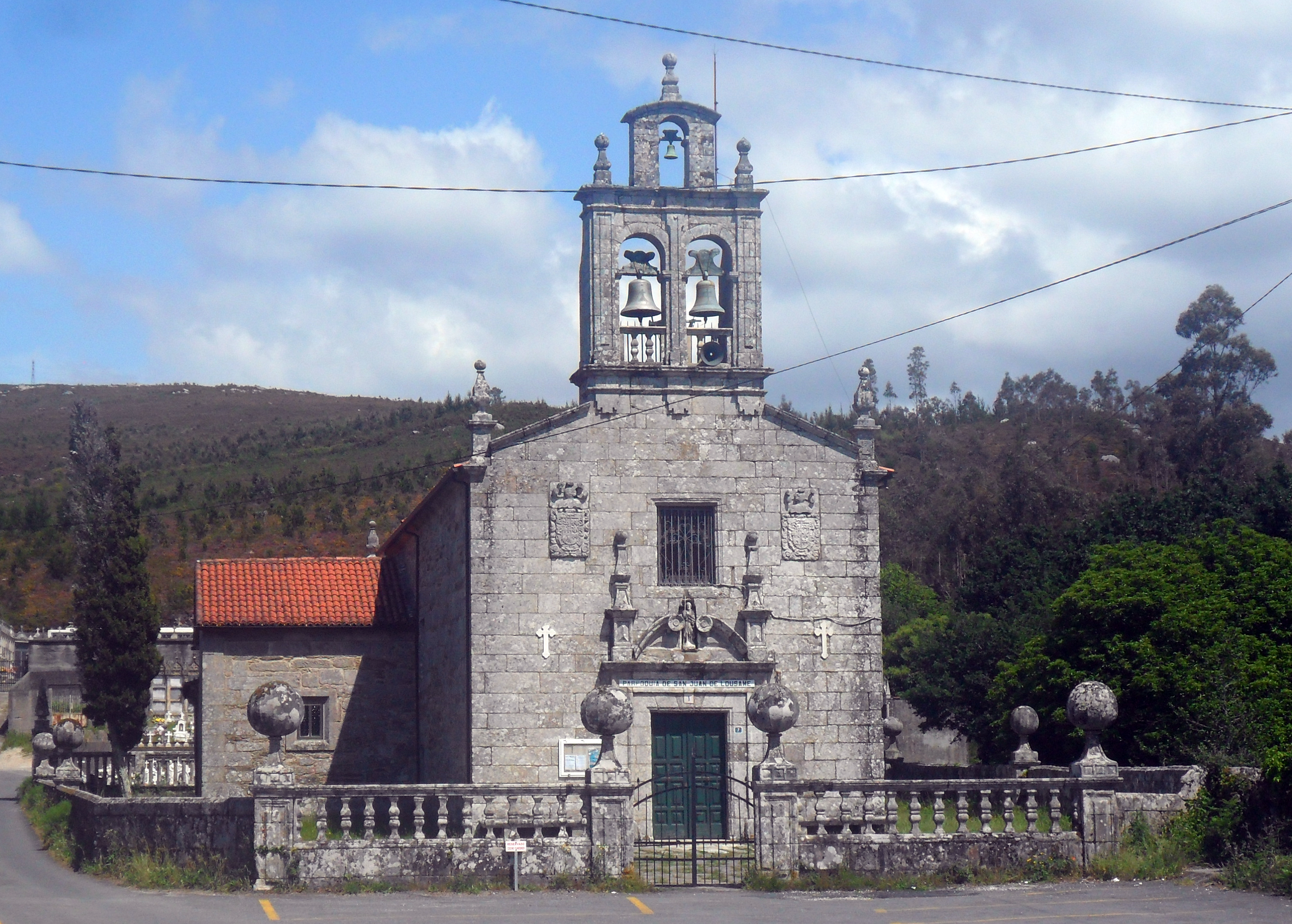 Igrexa Parroquial de Lousame, Lousame